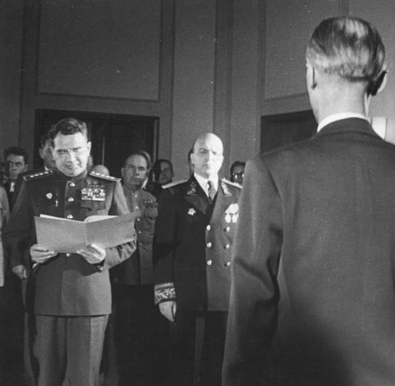 ADN-ZB/SNB Gründung der Deutschen Demokratischen Republik am 7.10.1949. Armeegeneral W.J. Tschuikow empfing am 10.10.1949 in Berlin-Karlshorst das Präsidium der Provisorischen Volkskammer der Deutschen Demokratischen Republik und den Ministerpräsidenten Otto Grotewohl in Anwesenheit des Außerordentlichen Botschafters der UdSSR in Deutschland W.S. Semjonow. UBz: Armeegeneral W.J. Tschuikow verliest die Erklärung. Neben ihm stehend W.S. Semjonow, im Vordergrund der Präsident der Provisorischen Volkskammer der DDR Dr. Johannes Dieckmann 4153-49